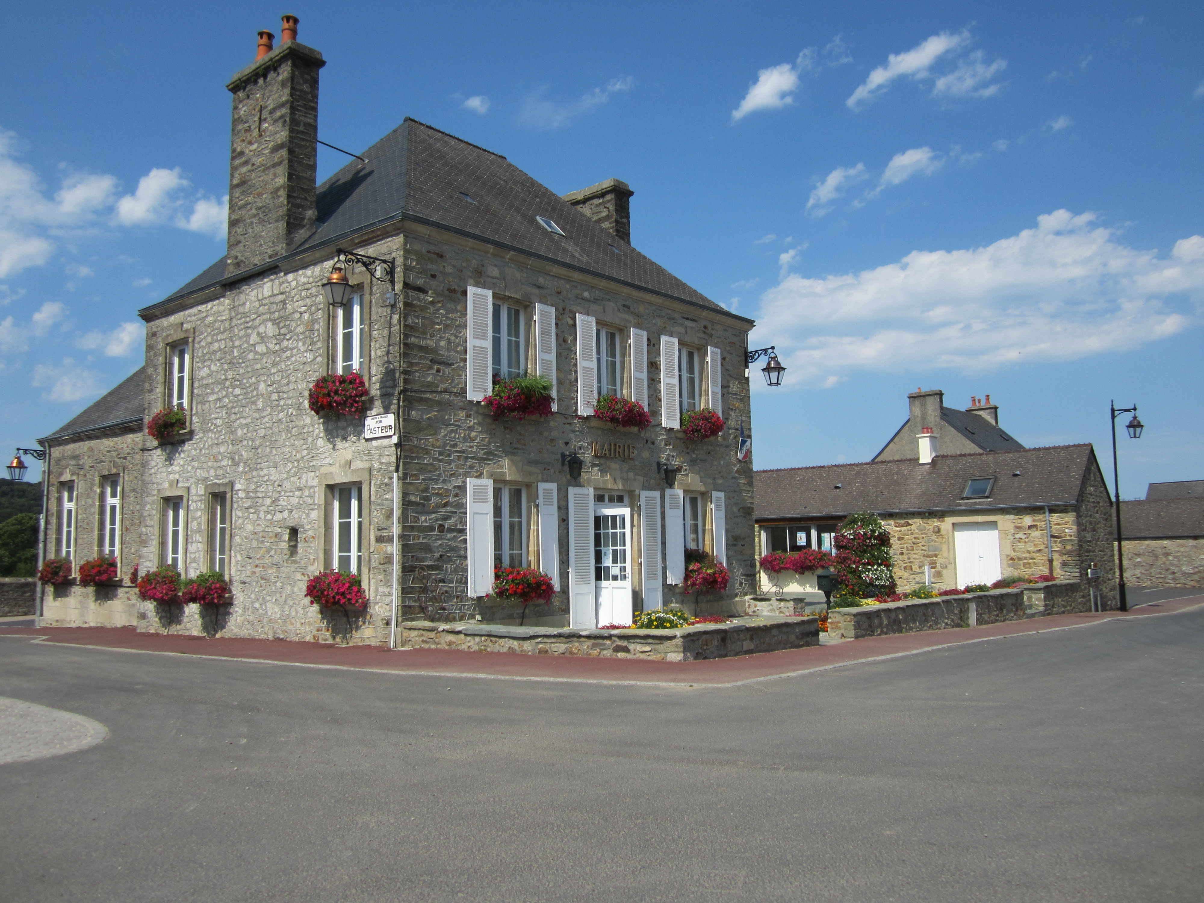 Mairie de Tollevast, Manche